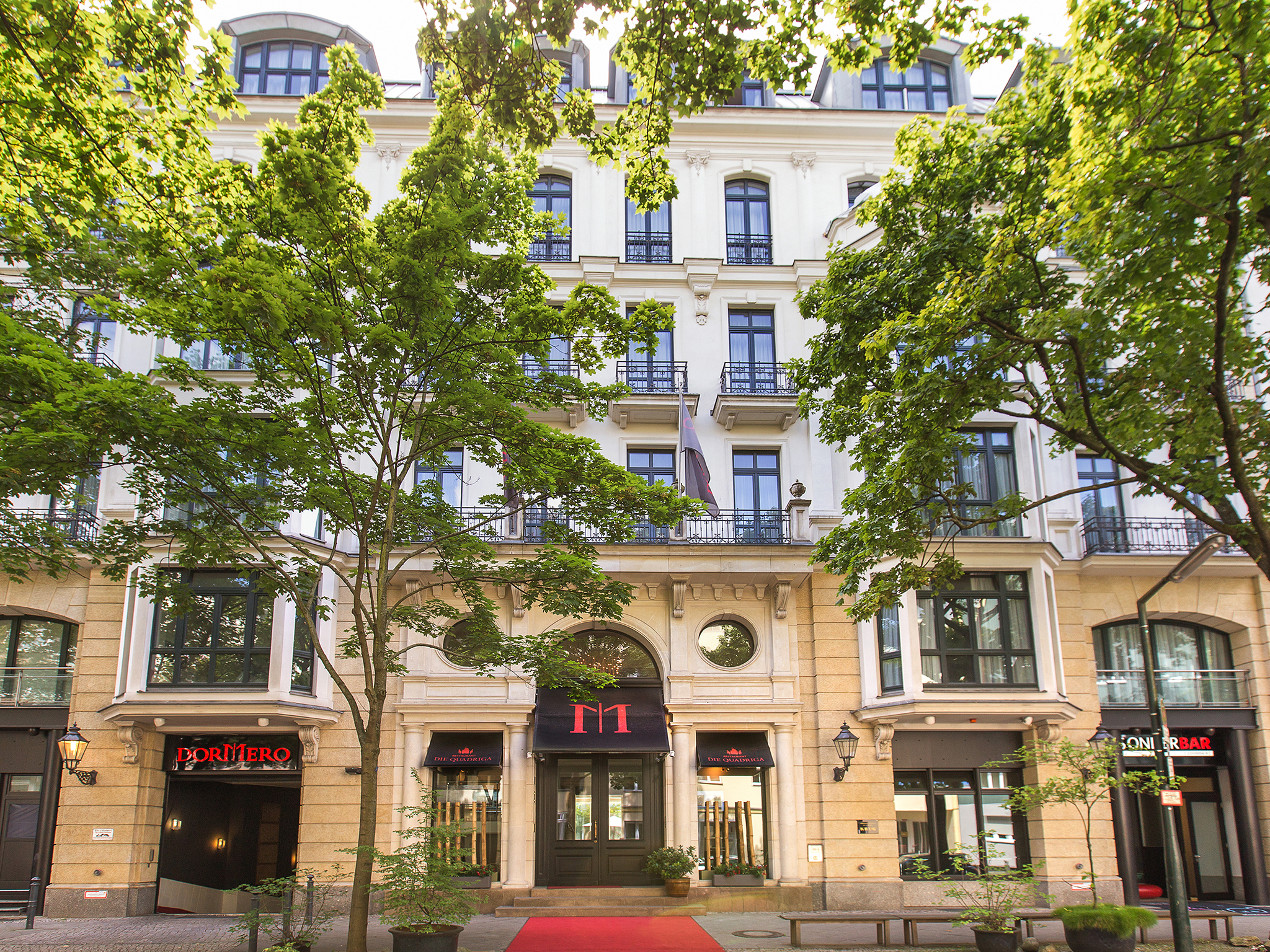 DORMERO Hotel Berlin Ku'damm